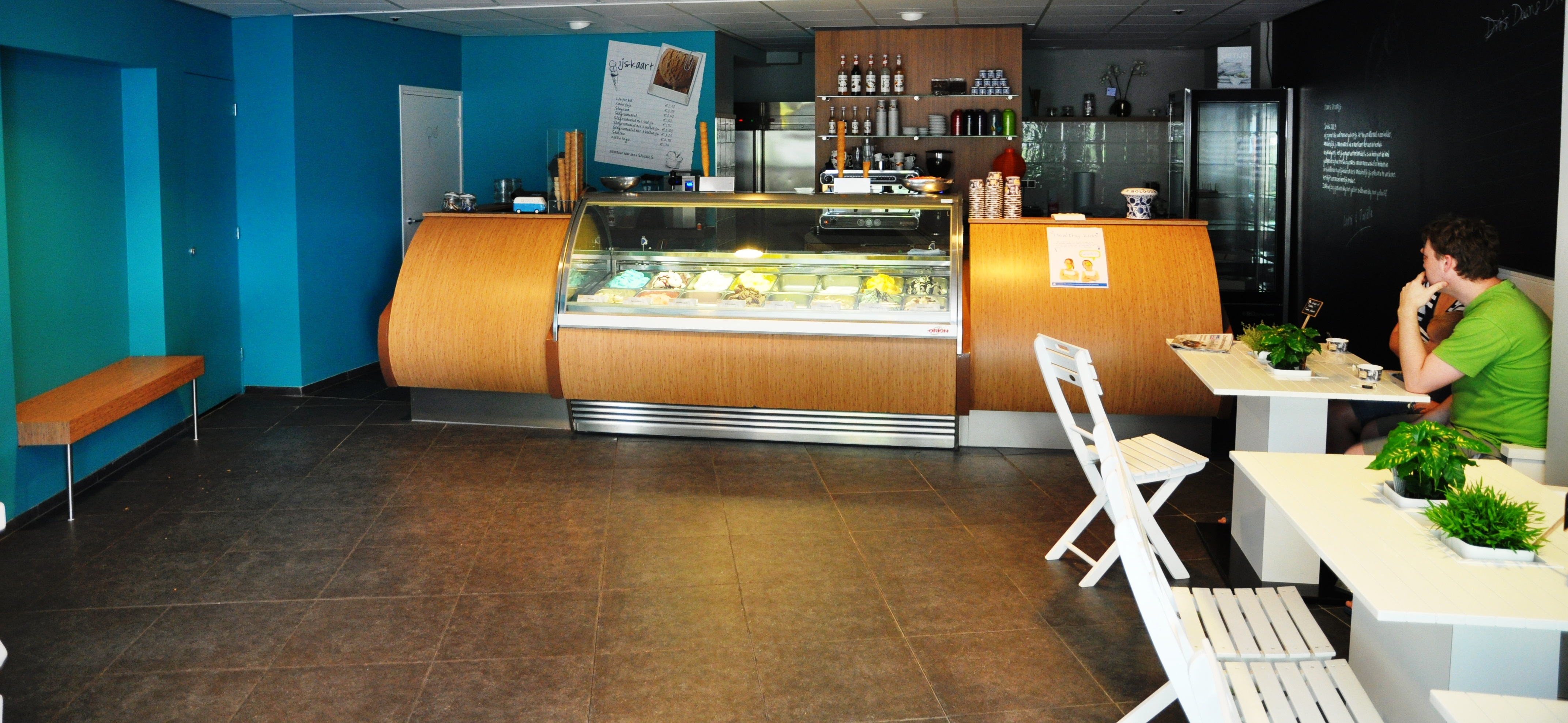 Daan's Droomijs in Montfoort.